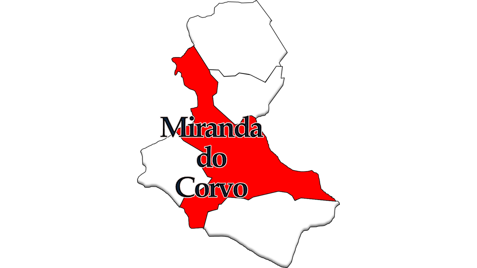 População